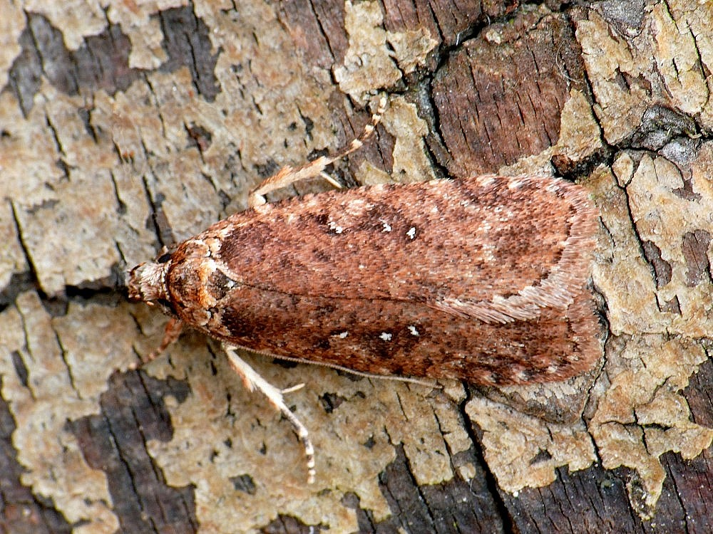 Agonopterix heracliana Trenčín - Kostoľná - pod kôrou stojaceho kmeňa listnáča na okraji lesa lužného typu